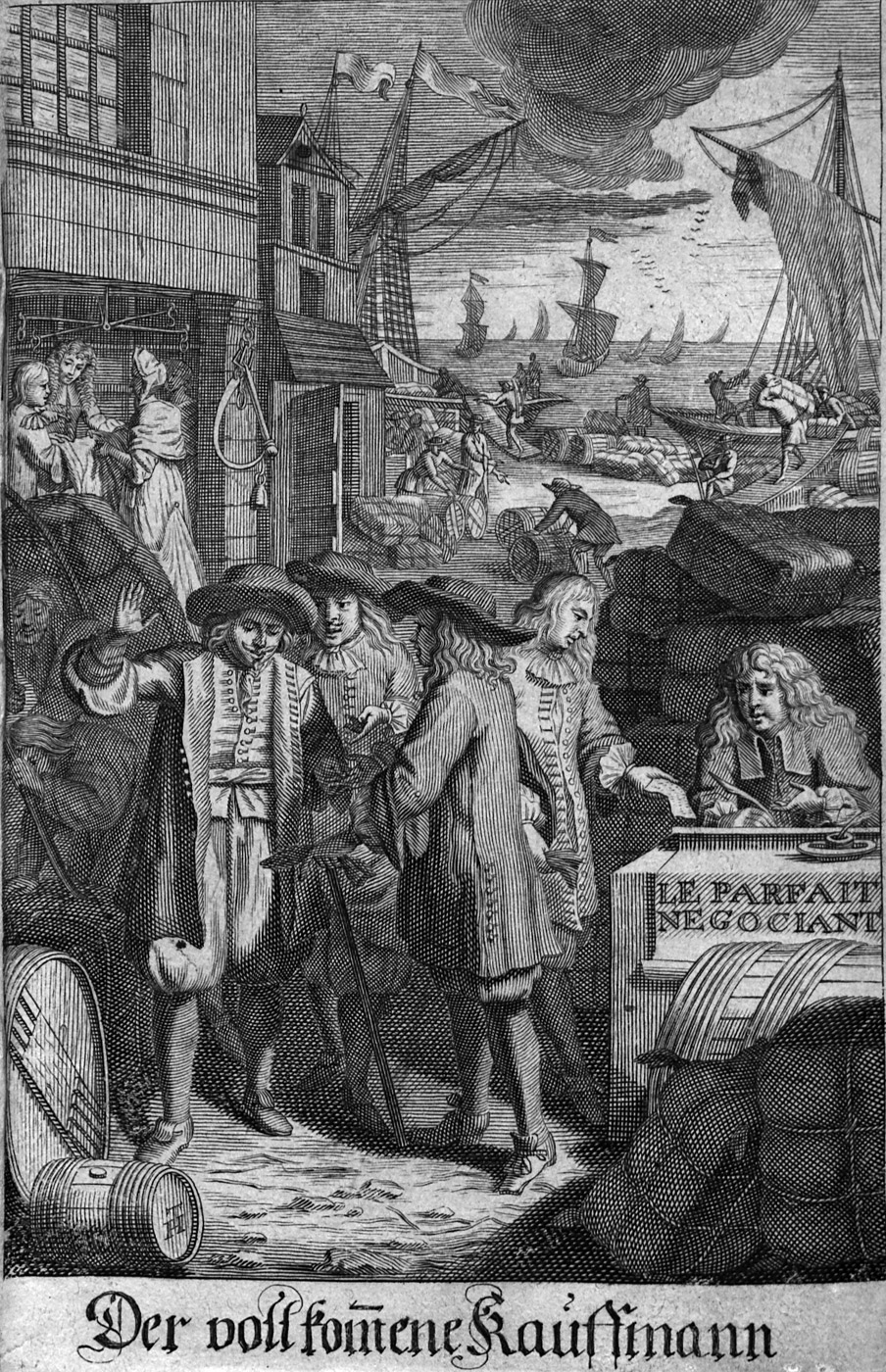 Stich aus: Jacques Savary: Le parfait Negociant ov Instrvction generale Pour ce qui regarde le Commerce de toute sorte de Marchandises, tant de France, que des Pays Estrangers... Der vollkommene Kauff- u. Handels-Mann, Oder Allgemeiner Vnterricht Alles, was zum Gewerb u. Handlung allerhand beydes Frantzösischer als Außländischer Kauffwahren gehört Genf, Widerhold, 1676.